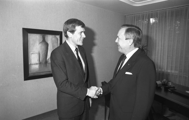 16.10.1987 Bundesrat-Präsident Dr. Walter Wallmann empfängt den Bevollmächtigten des Freistaates Bayern beim Bund, Dr. Georg Freiherr von Waldenfels, zum Antrittsbesuch im Bundeshaus, Bundesrat-Flügel